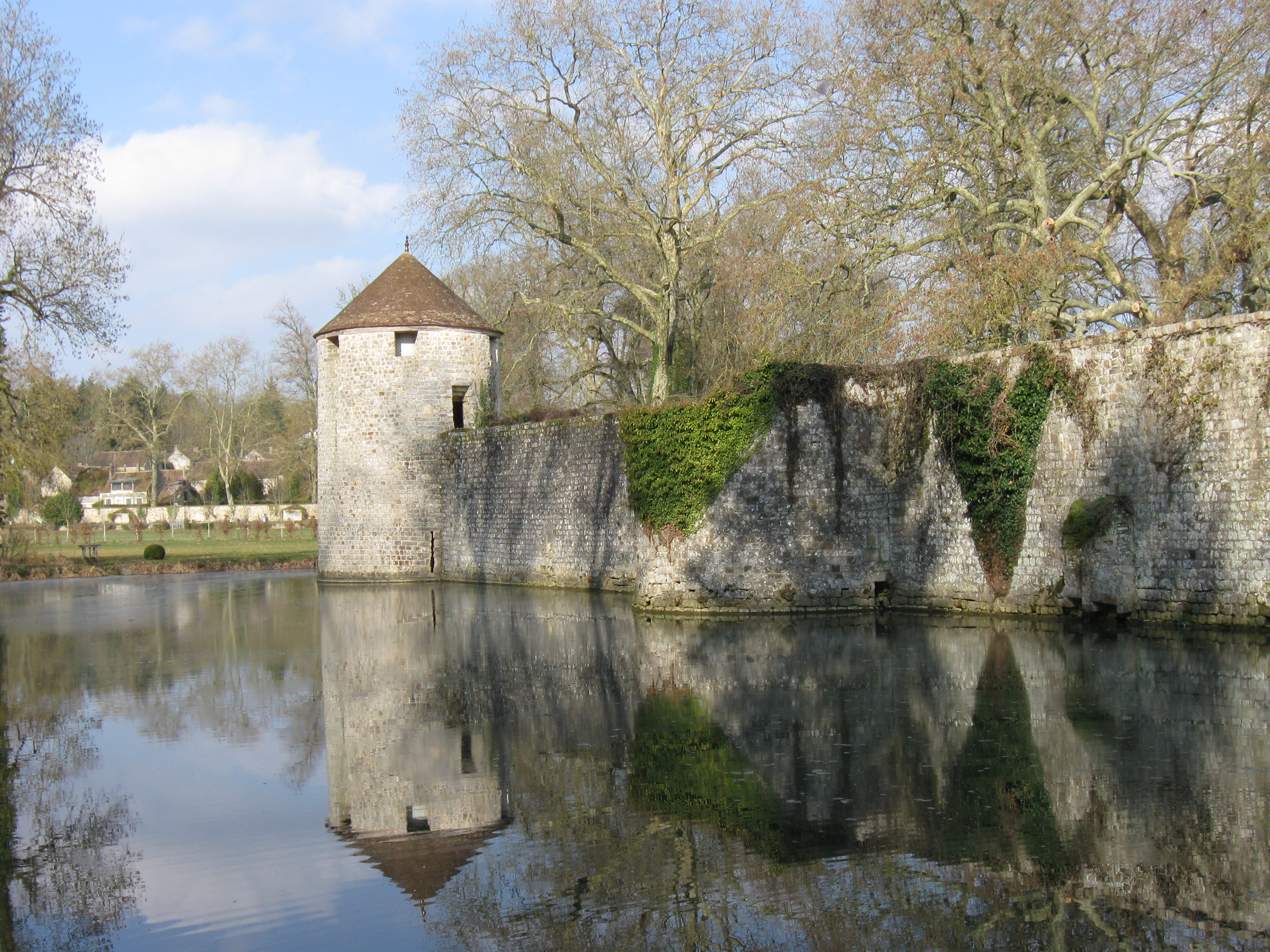 Manoir féodal de Diant. (Seine-et-Marne, région Île-de-France).